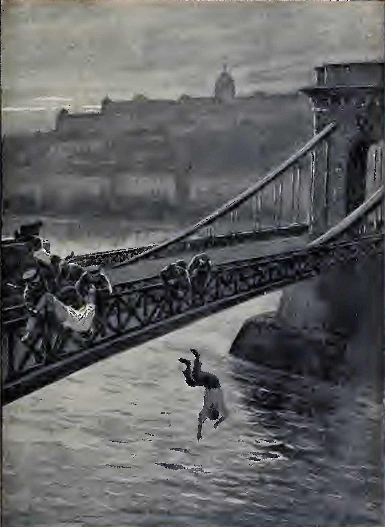 LEBRUN, Armand: La dictature du prolétariat les ravages du bolchévisme en Hongrie illustration